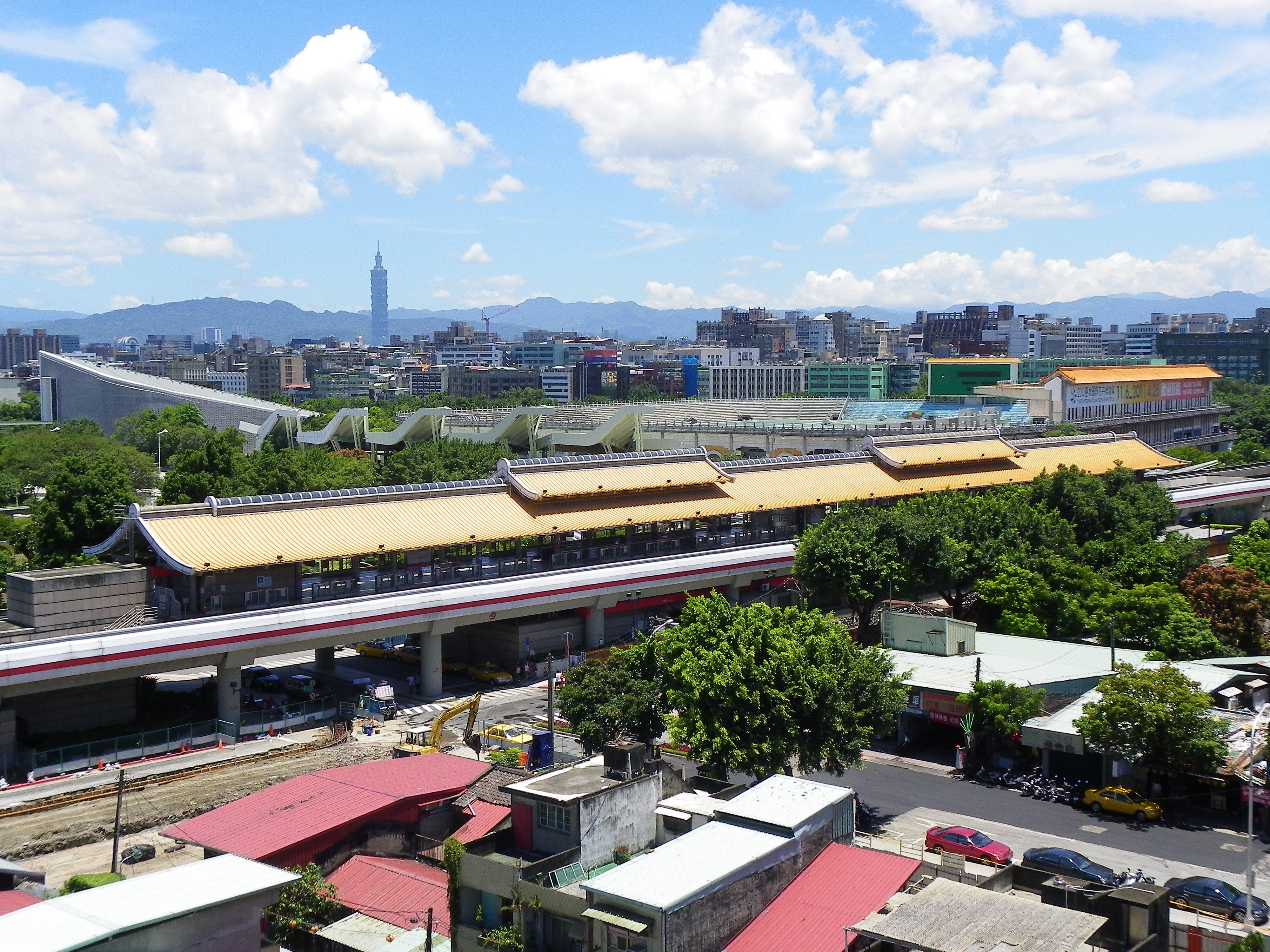 台北捷運淡水線円山駅。